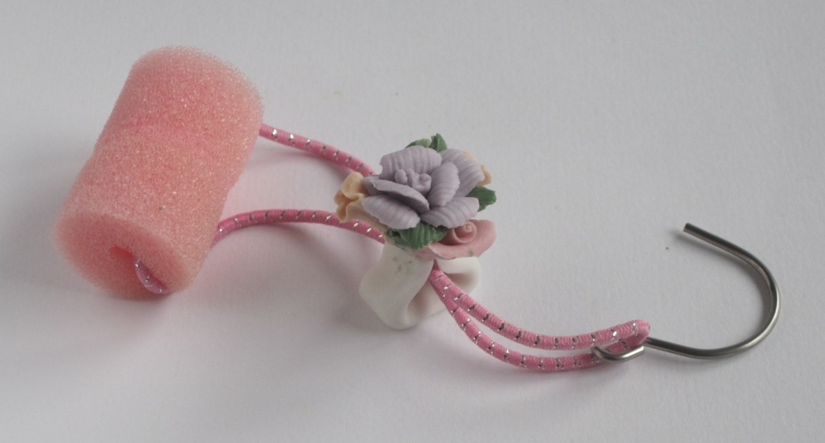 Ein Tropfenfänger für Kaffeekanne oder Teekanne